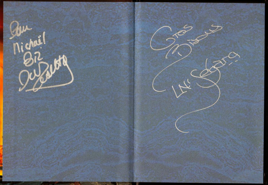 Dédicace de Julie ZENATTI et de Hélène SEGARA dans le livre DVD de Notre Dame de Paris.